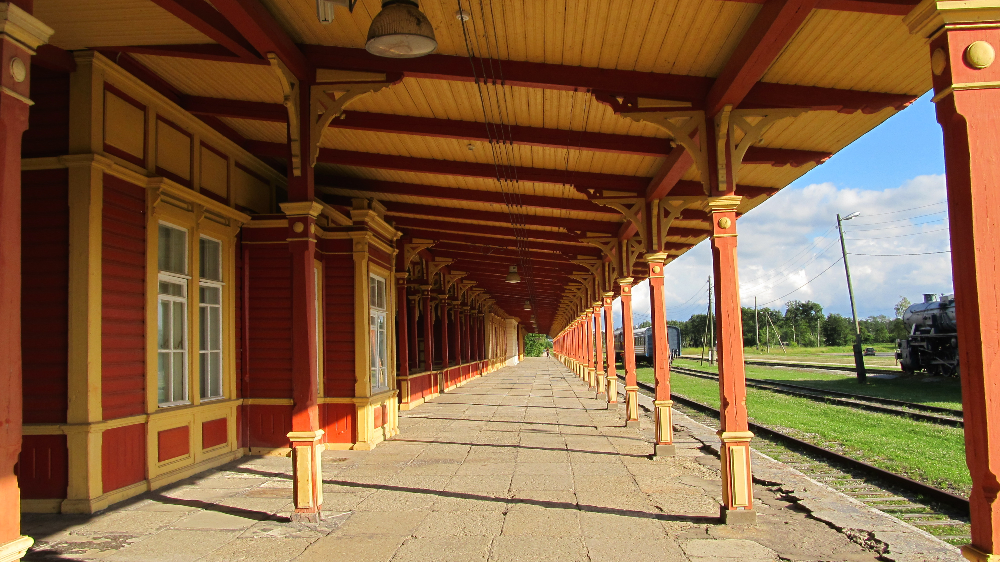 Haapsalu raudteejaama hoone perroonidega